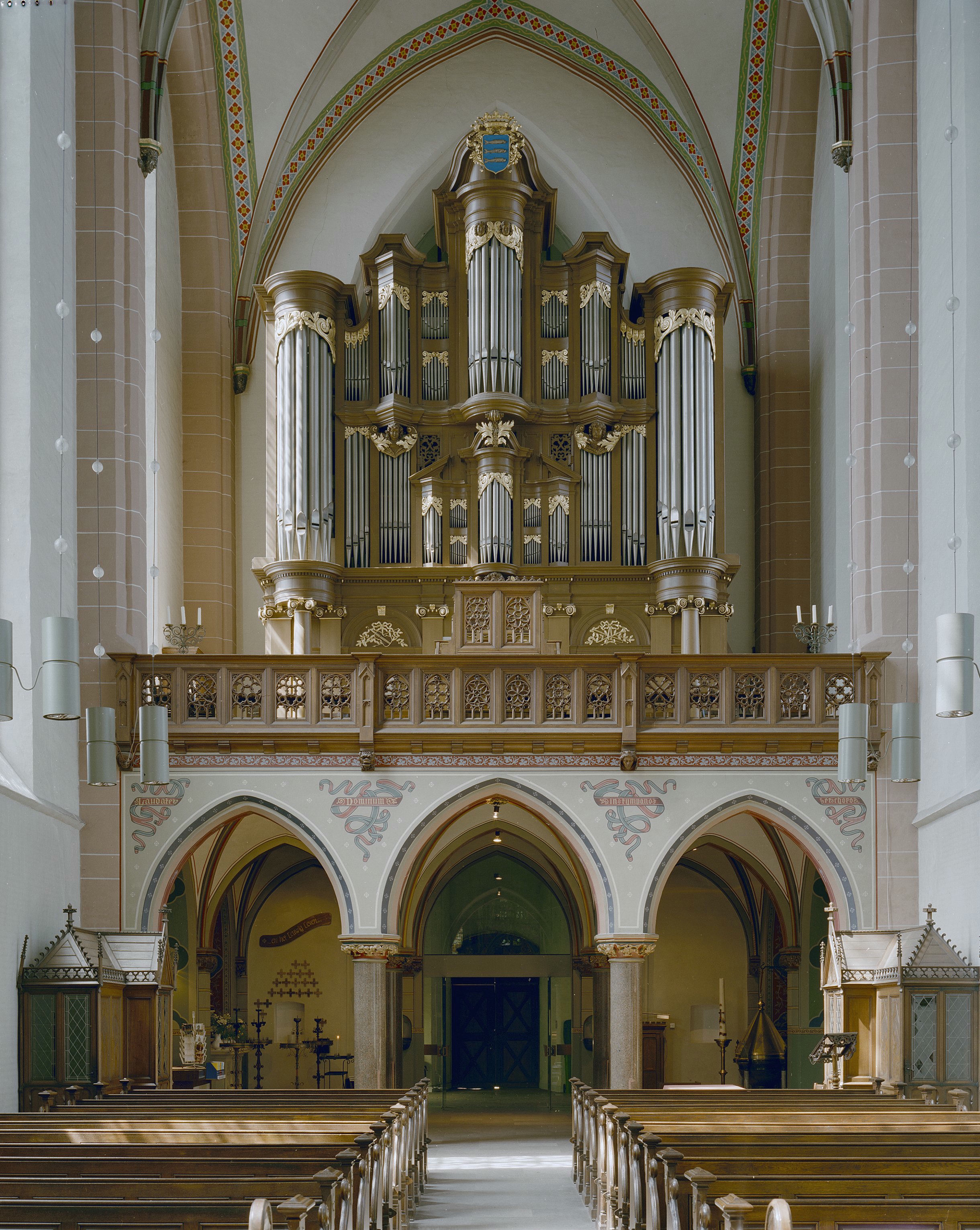 Rooms-katholieke kerk Onze Lieve Vrouwe Hemelvaart: Interieur, aanzicht orgel, orgelnummer 1794 (opmerking: Gefotografeerd voor Het Historische Orgel in Nederland 1479-1725, bladzijde 266)